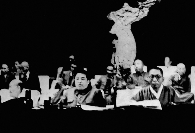 남북조선 정당 사회단체 대표자련석회의시 홍명희선생 김일성수령 김구선생